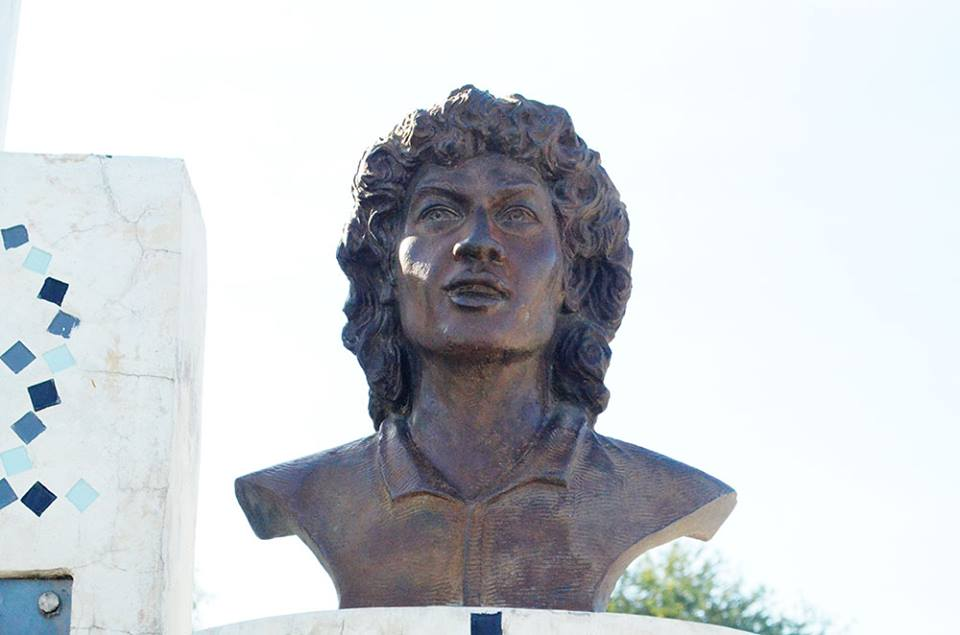 Grab von Sebastiao Gomes